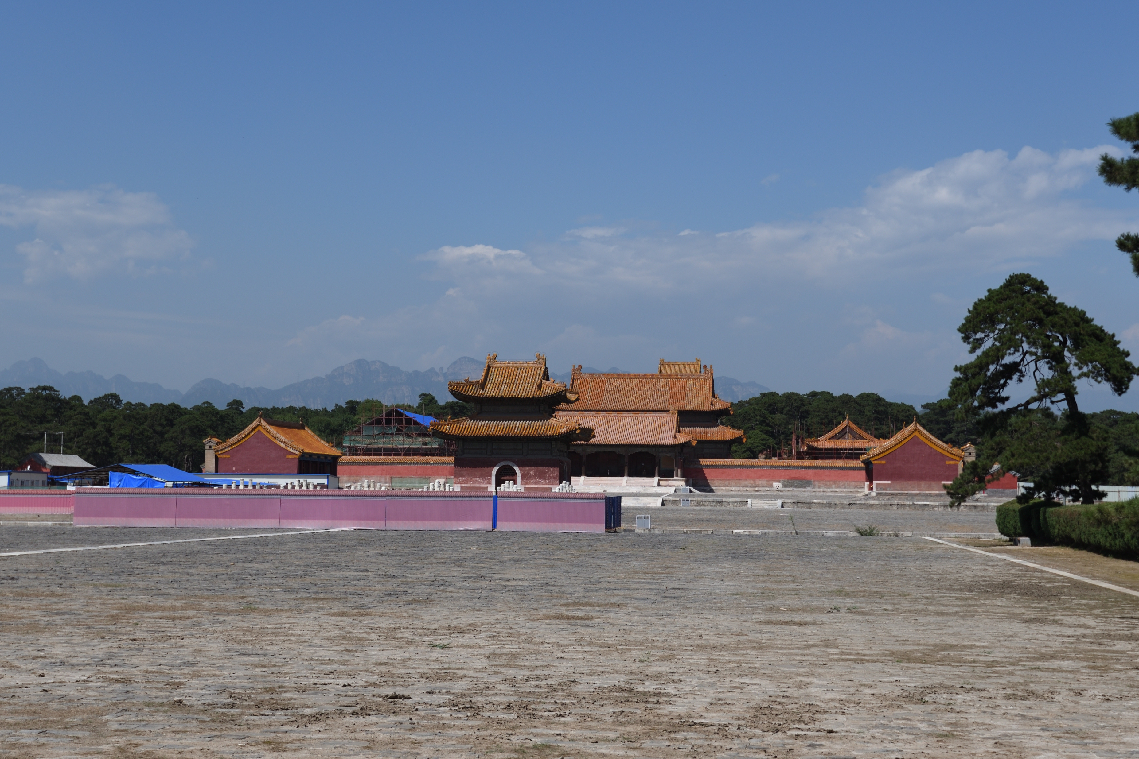 昌陵（嘉庆帝墓）